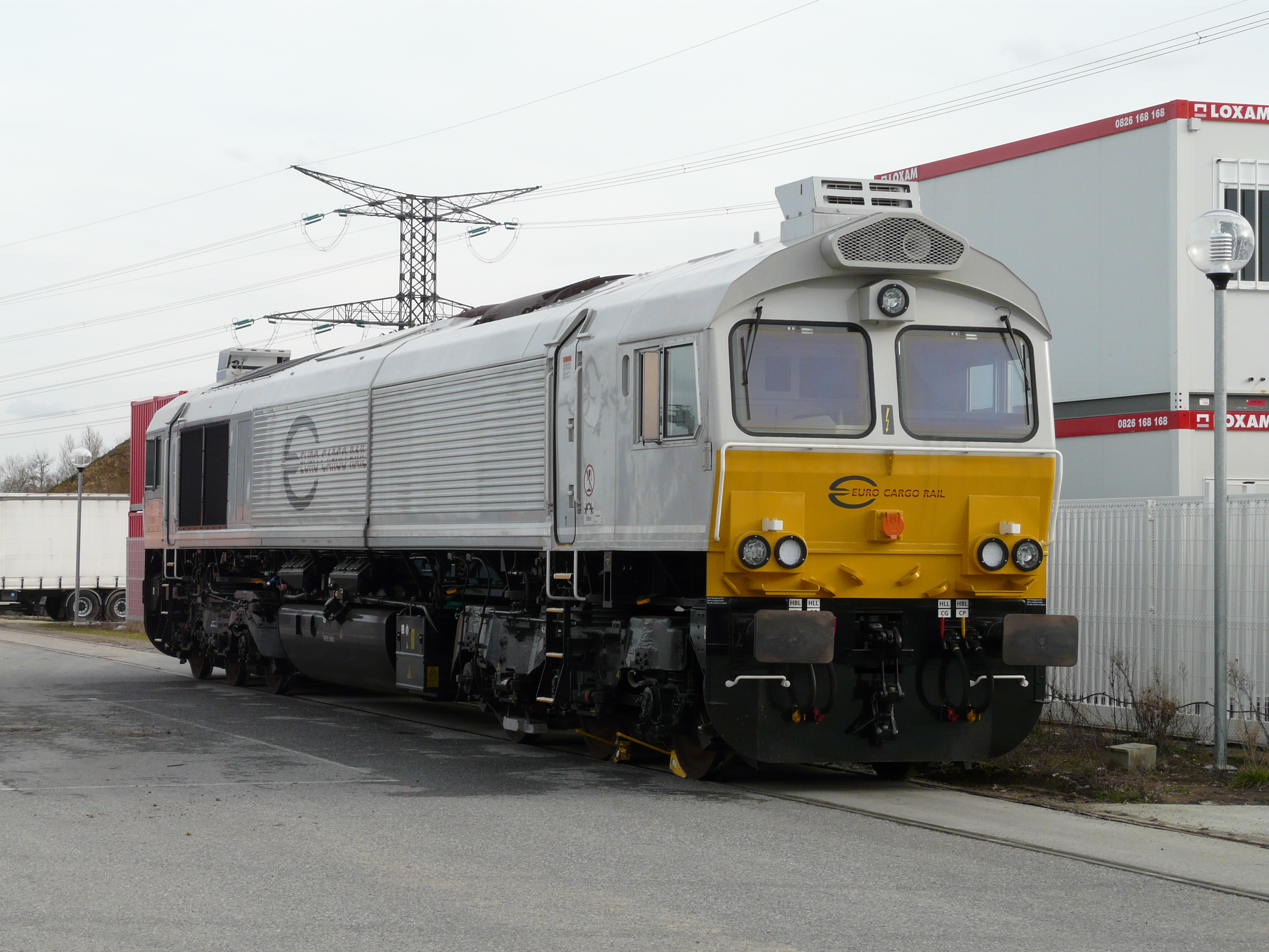 Class 77 Eurocargorail